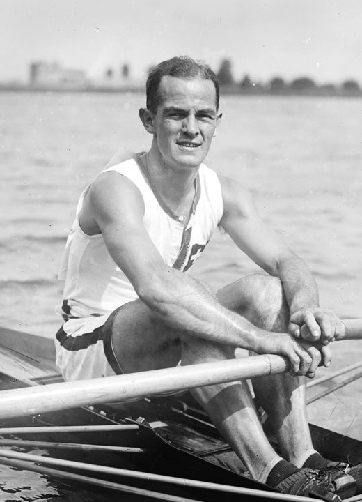 Schmid (Zurich) gagnant [du] 1 rameur, skiff [Mâcon, championnats d'Europe d'aviron, 15/8/20] : [photographie de presse] / [Agence Rol]